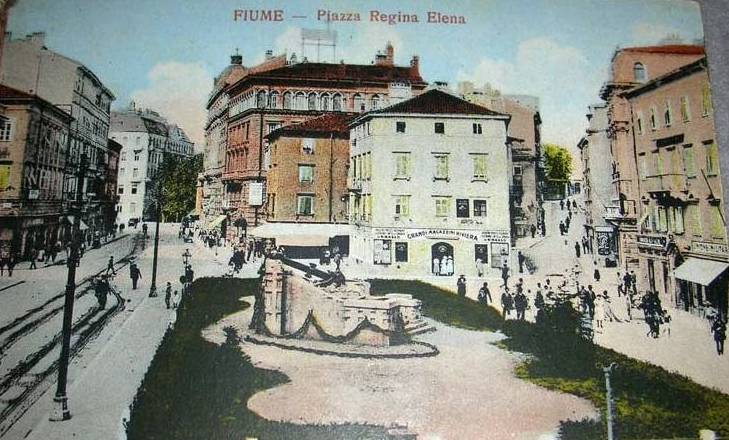 jadranski trg, nekad, italia